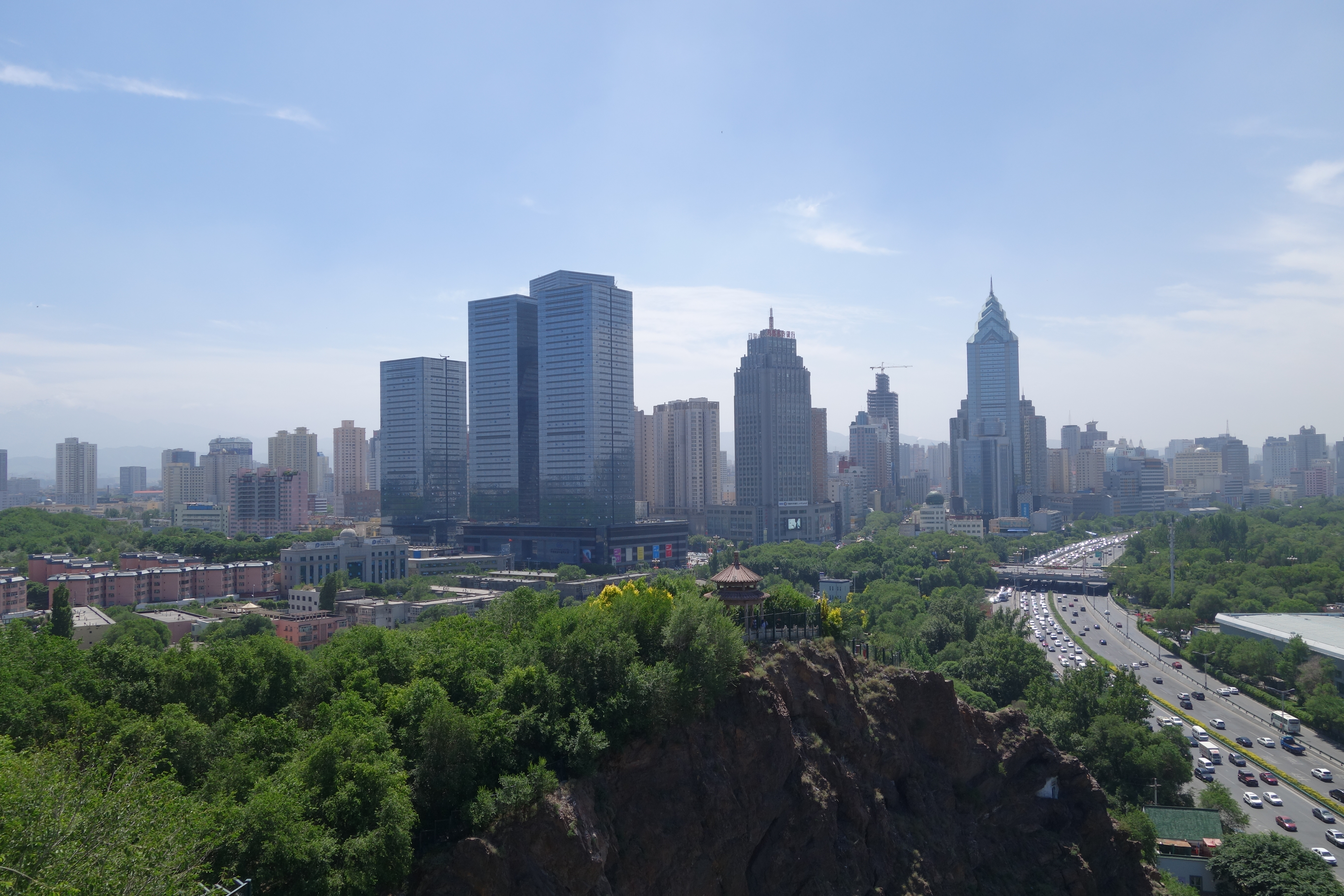 Geschäftsviertel Ürümqi, China